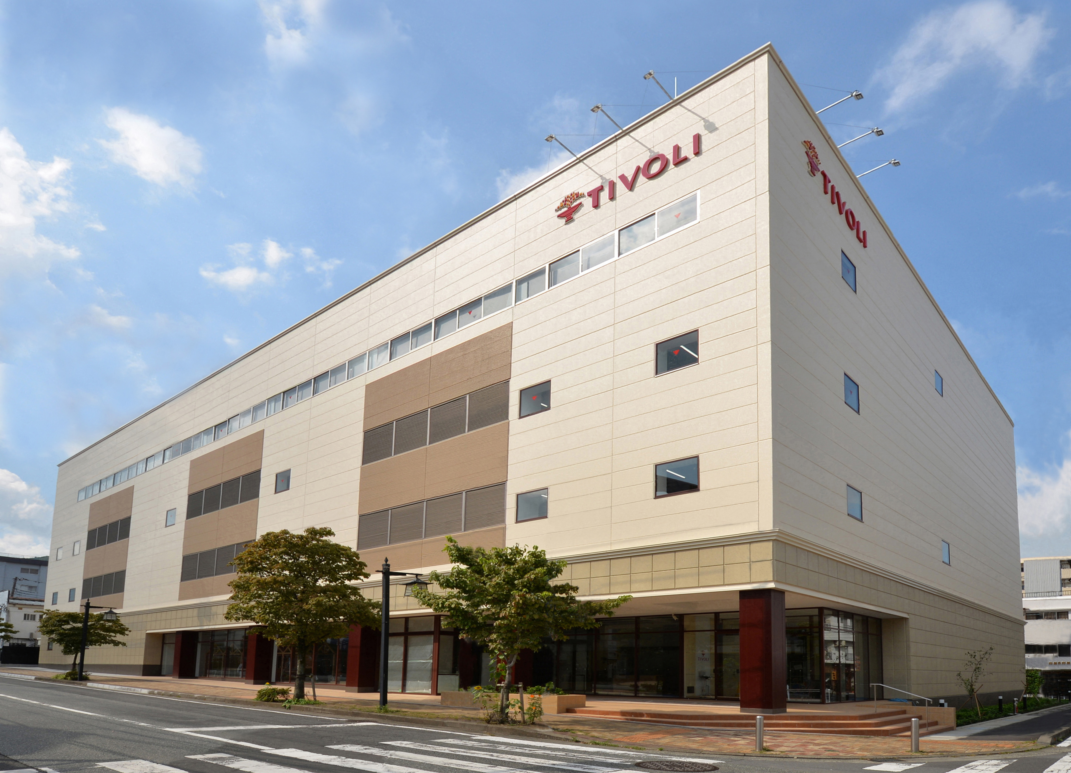 ちぼり 社屋